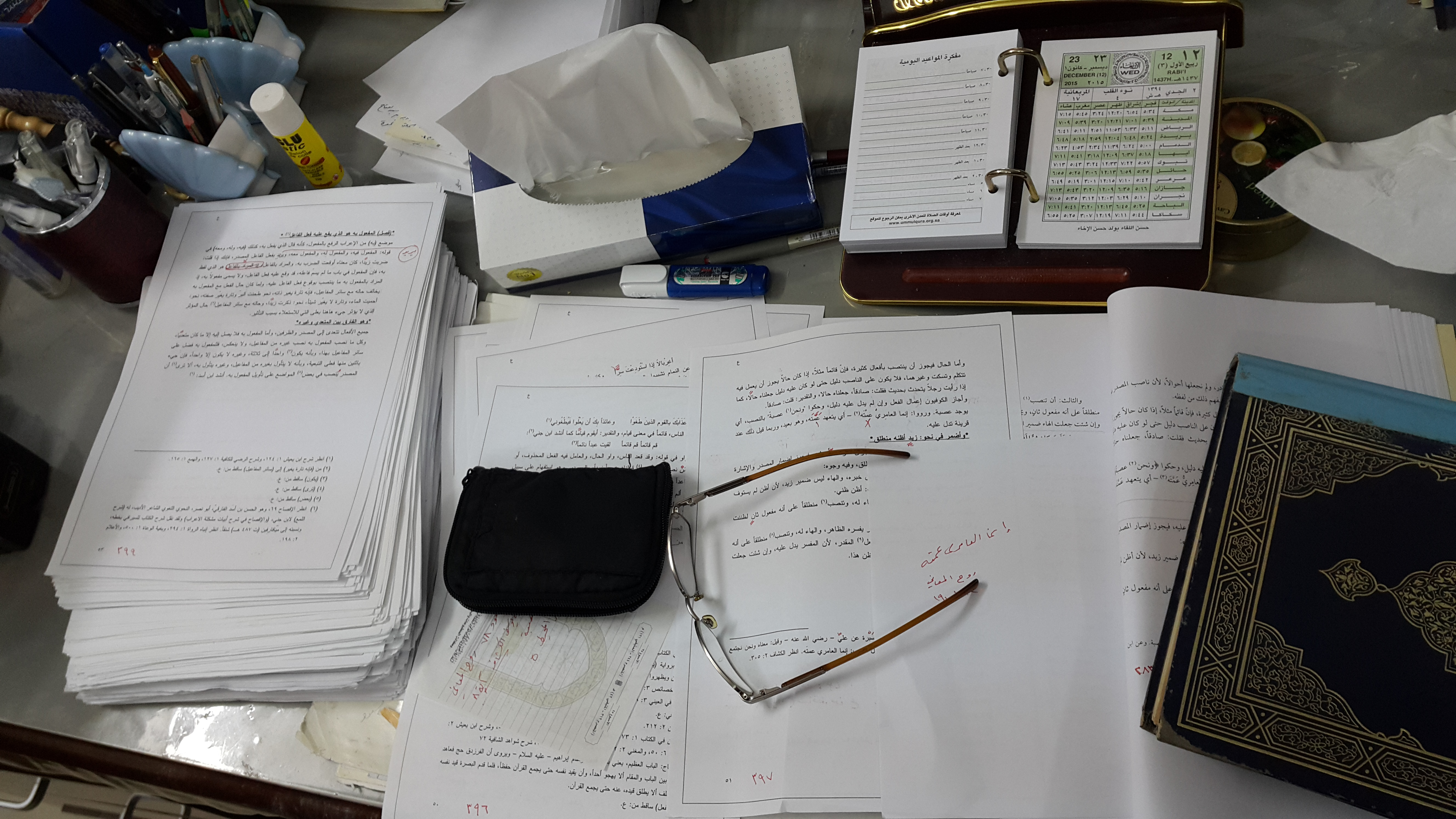 مكتب الأستاذ الدكتور محمود بن يوسف فجال قبل وفاته بدقائق حيث كان يحرر مسألة نحوية